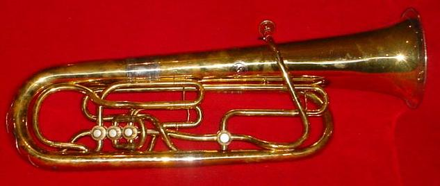 F-tuba Ahlberg & Ohlsson ca år 1890 Foto: Användare:Lars sjostrand